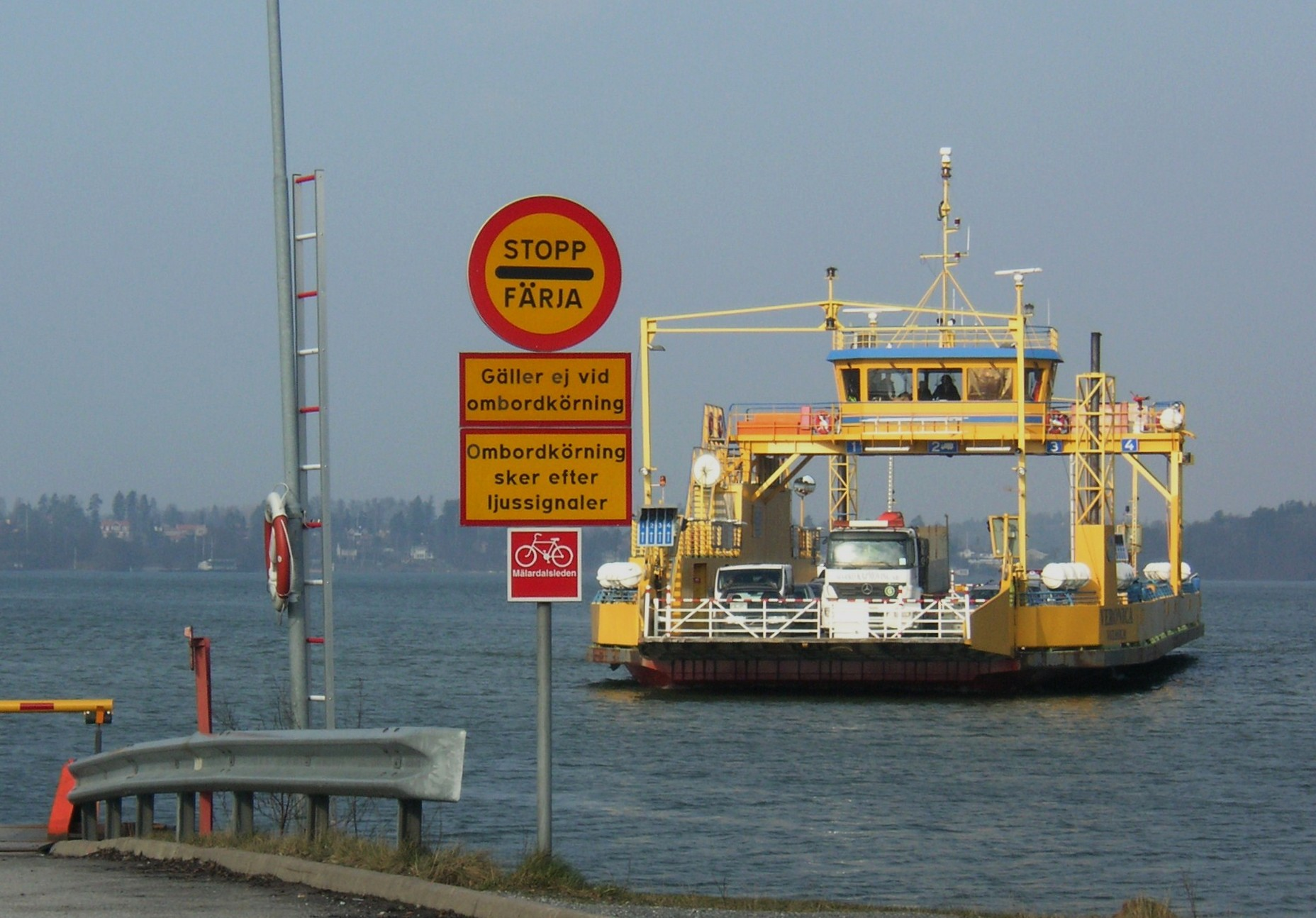 Vägverkets färja mellan Slagsta och Ekerö